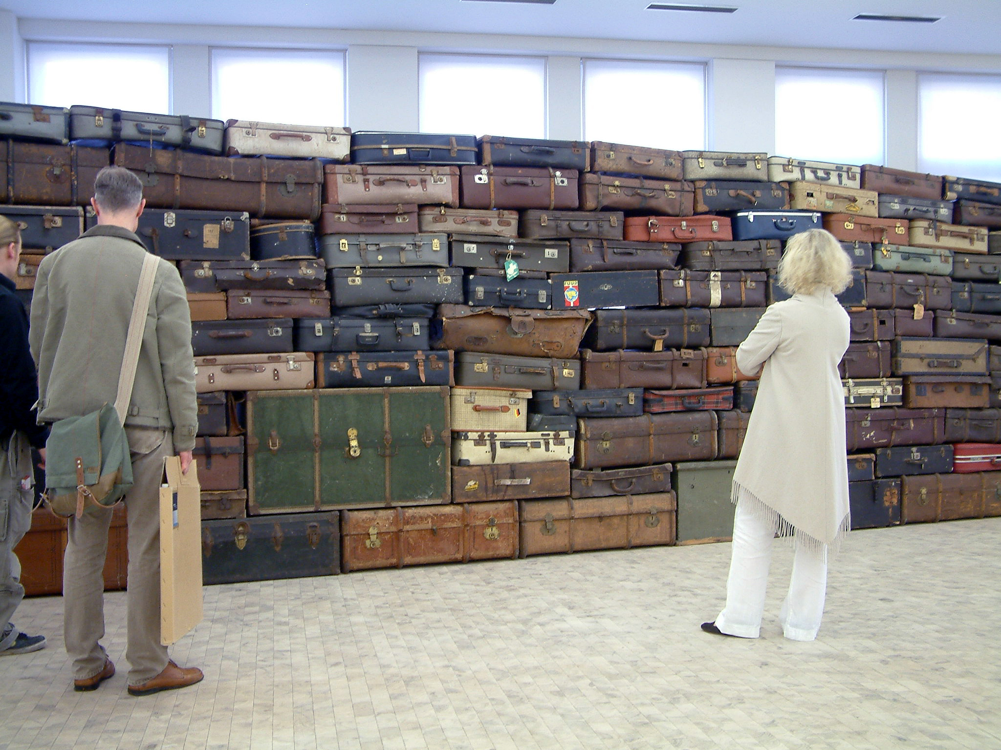 Ausstellung Koffermauer-Klagemauer in der Stadtgalerie Kiel